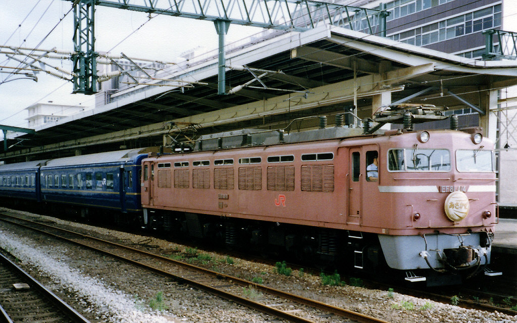 EF81形400番台牽引上り寝台特急「あさかぜ4号」博多駅にて撮影